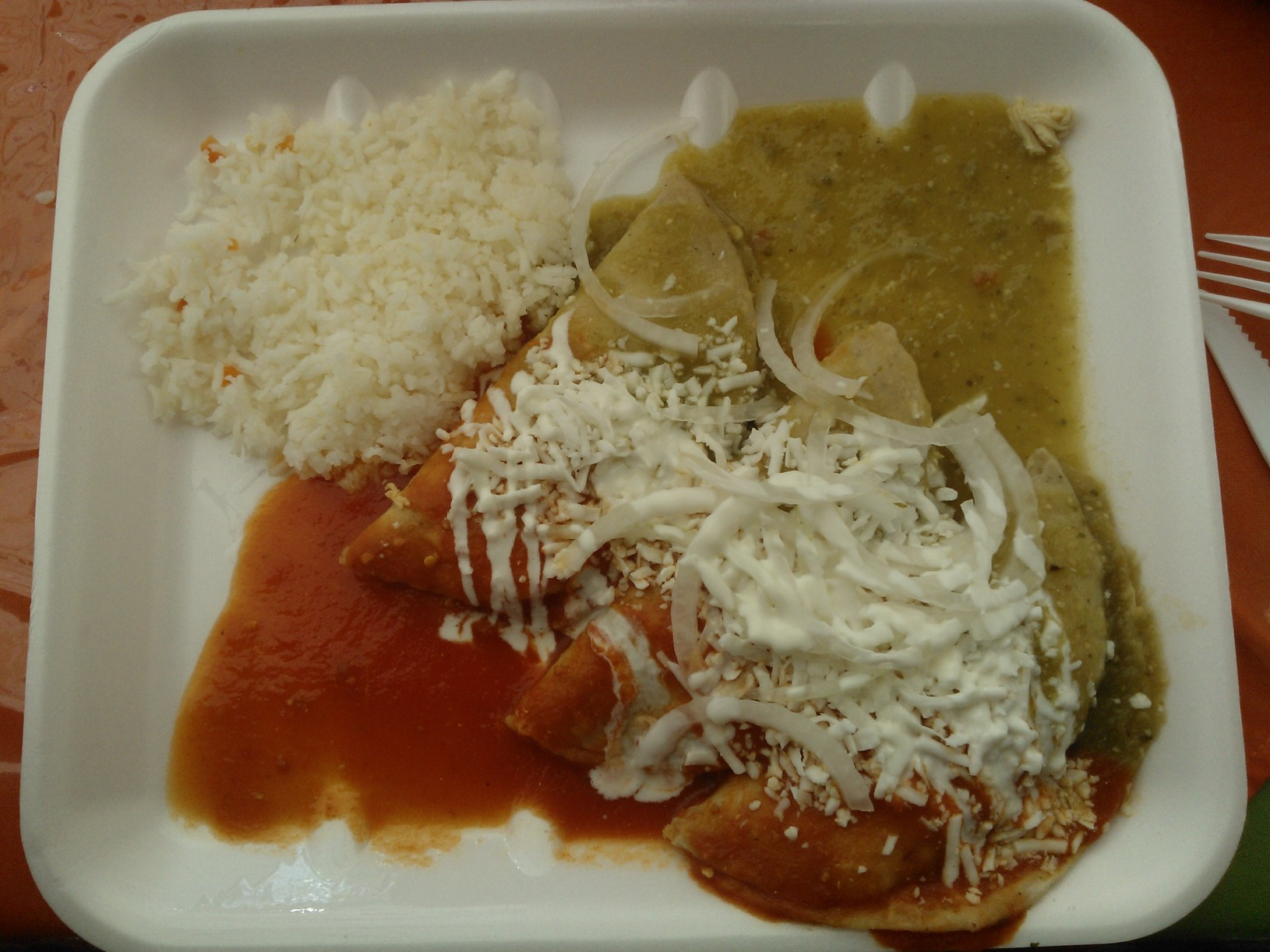 Fotografía de enchiladas rellenas de pollo con arroz cubiertas en salsa verde y roja, dentro del Festival turístico y gastronómico de la Enchilada, que se llevó a cabo en el Jardín Cuitláhuac, en la delegación Iztapalapa.